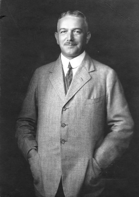 Konstantin von Neurath Porträt Konstantin Freiherr von Neurath Abgebildete Personen: Neurath, Konstantin von Freiherr: Außenminister, Reichsprotektor für Böhmen und Mähren, Deutschland (GND 118786016)